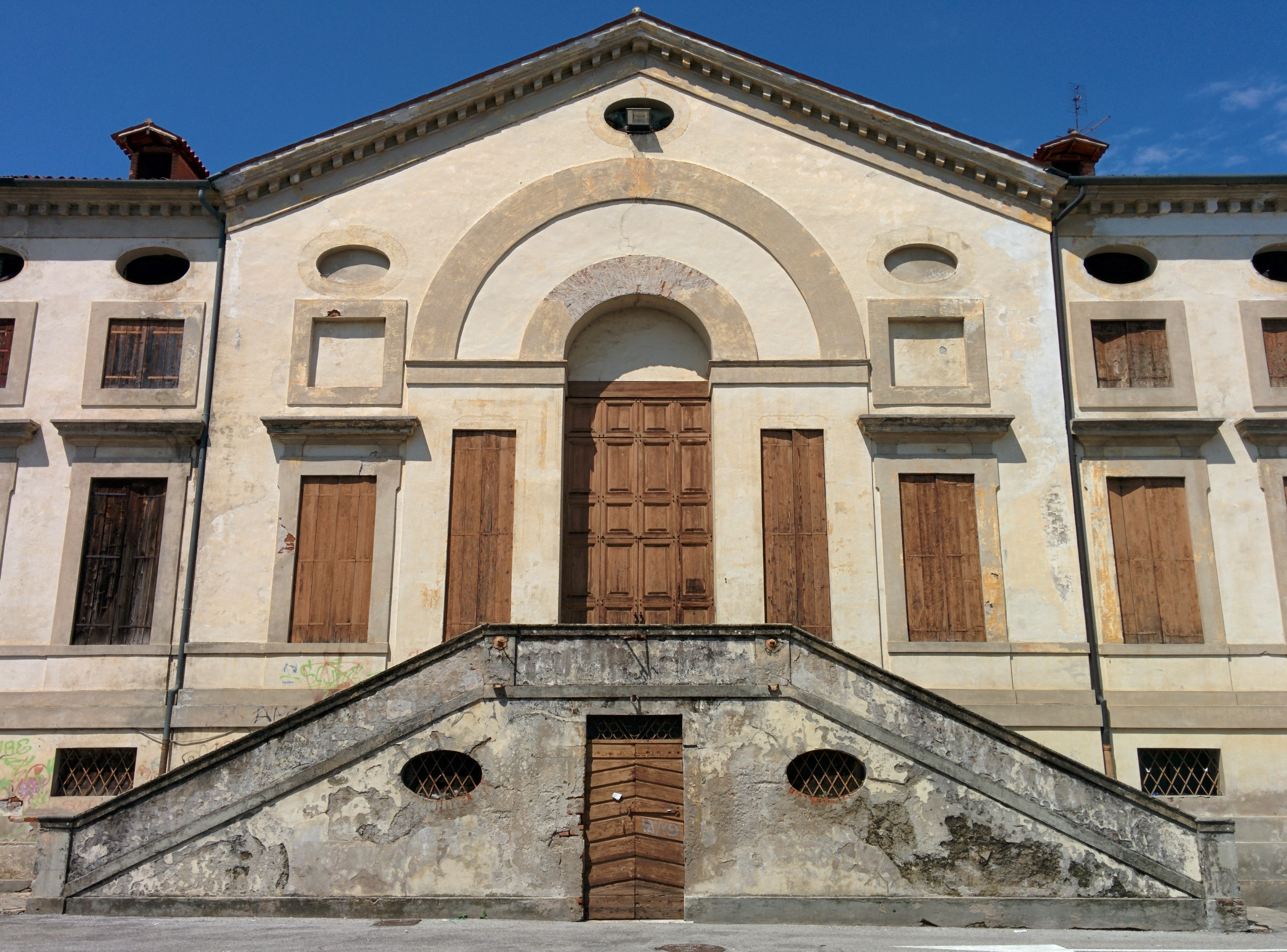 Ex Municipio in Piazza Bruno Viola a Caldogno, in provincia di Vicenza